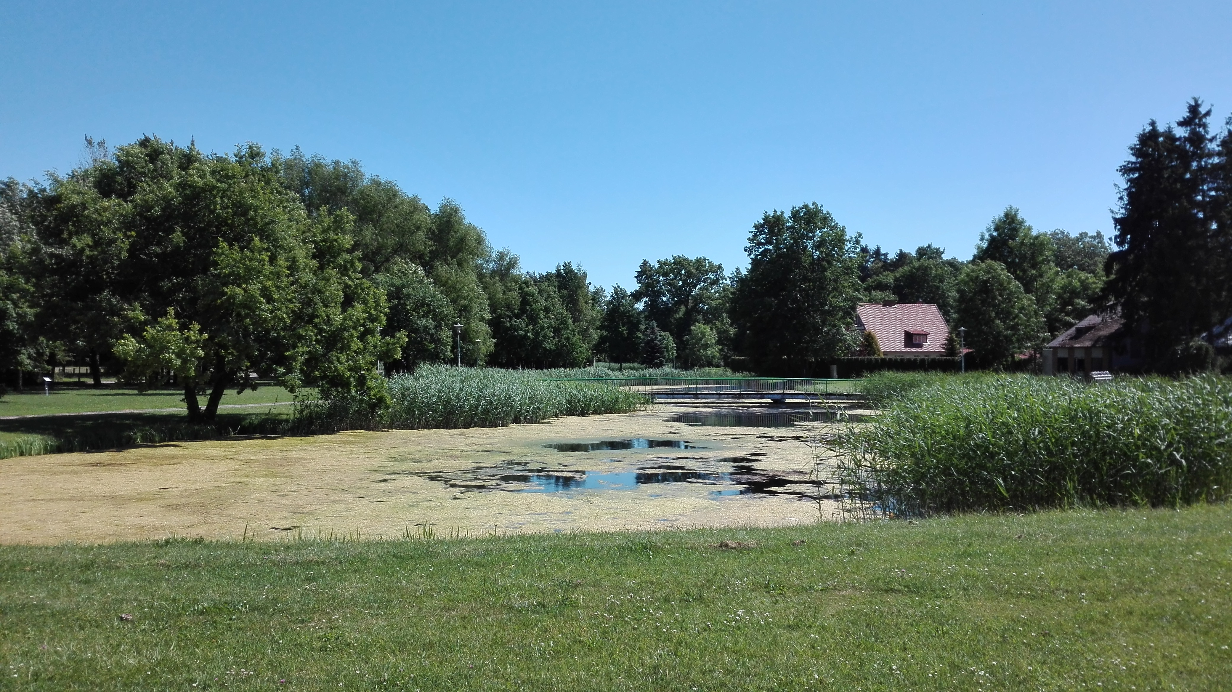 Buvęs Hugo Šojaus dvaro parkas